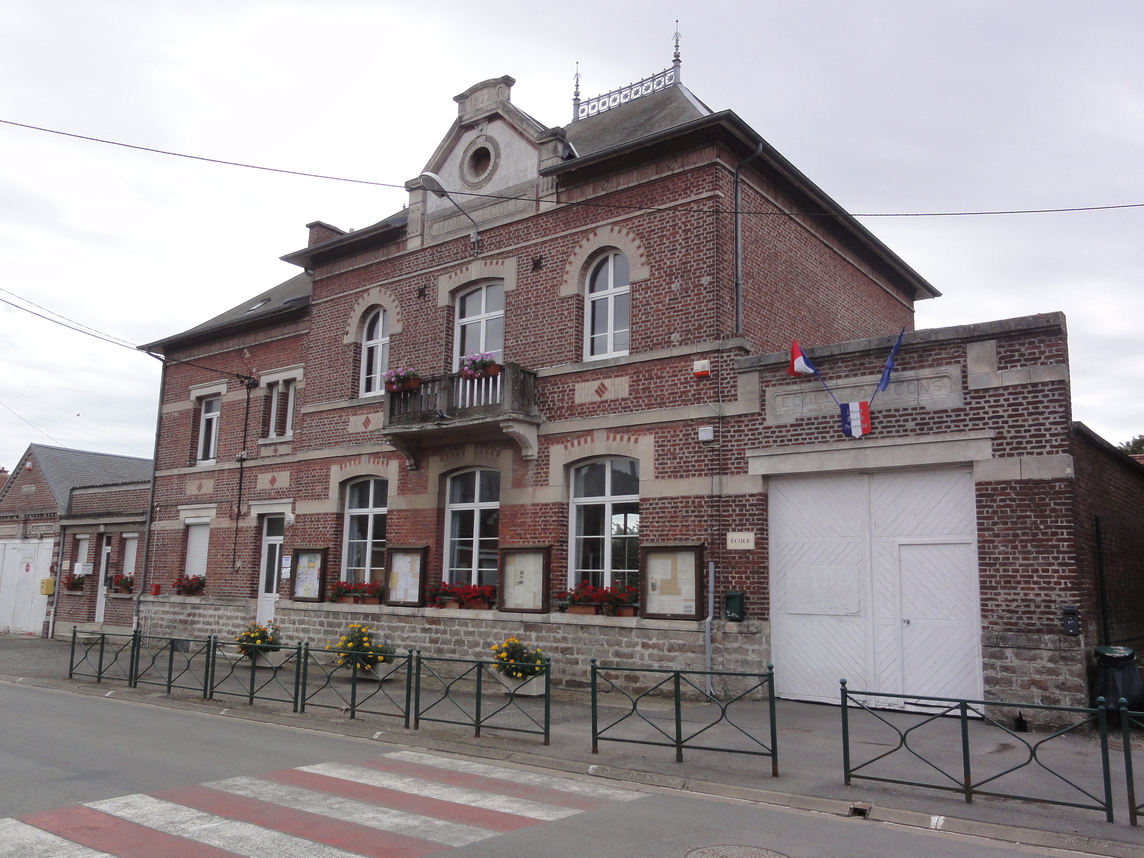 Cugny (Aisne) mairie-école